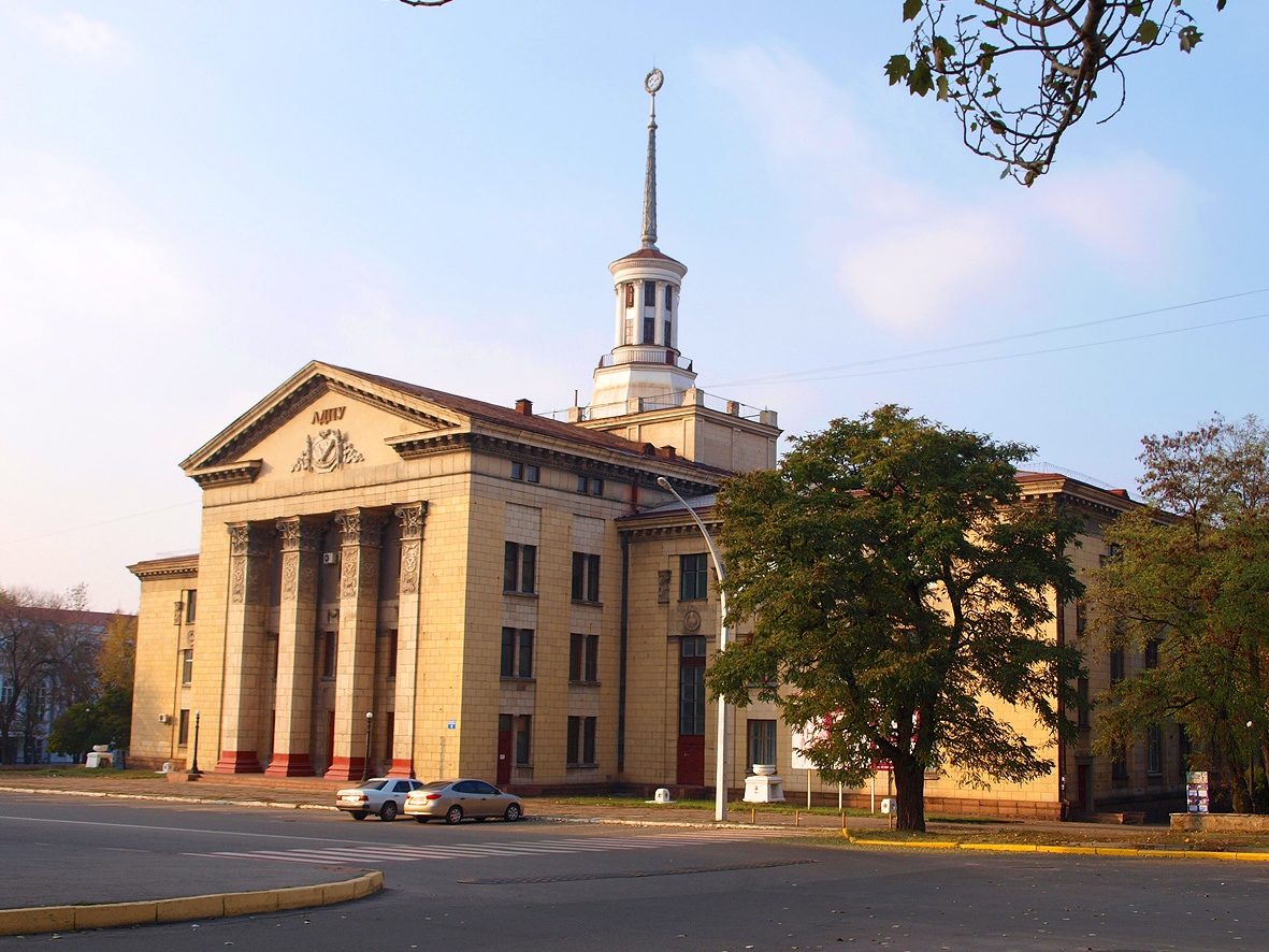 Луганский дом техники